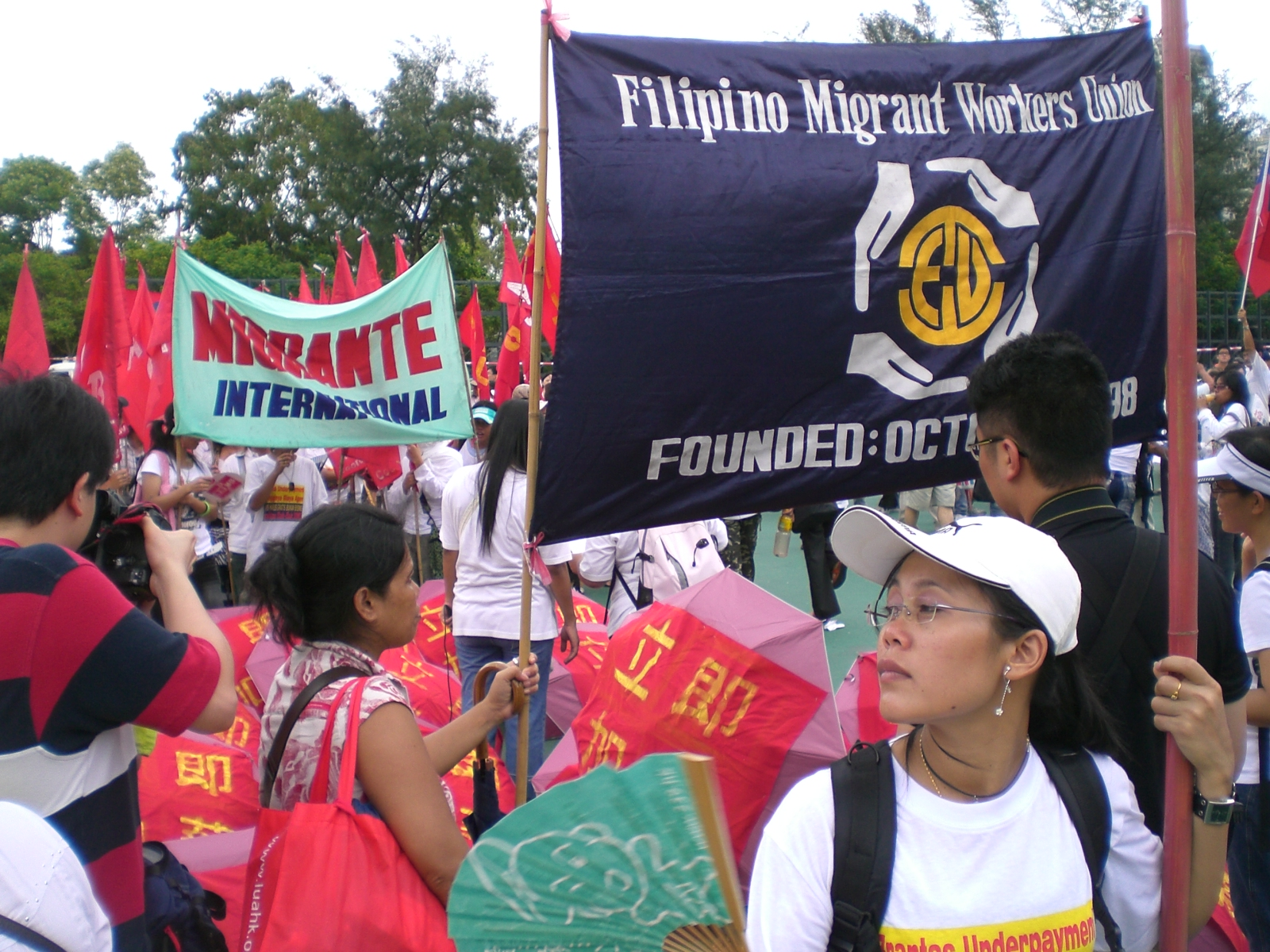 Author= VP7071 外籍家庭傭工在香港.